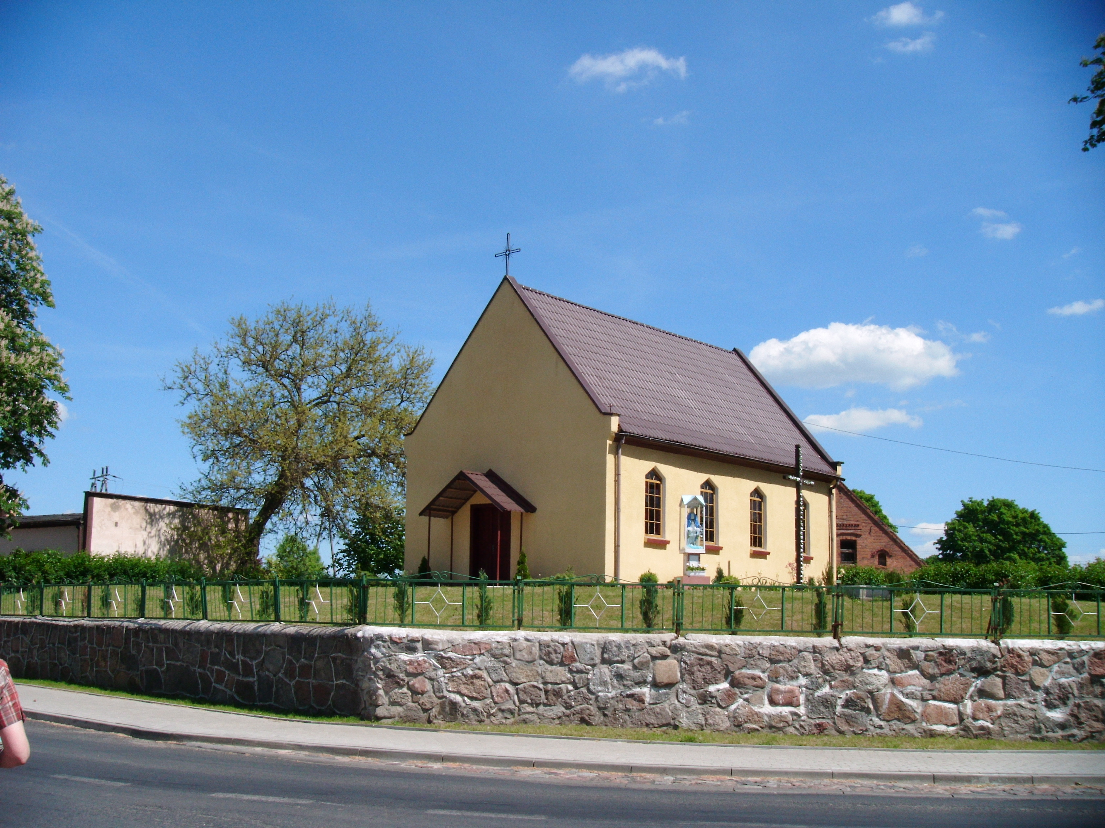 Święciechów - rzymskokatolicki kościół filialny p.w. Matki Boskiej Częstochowskiej (XX w.)